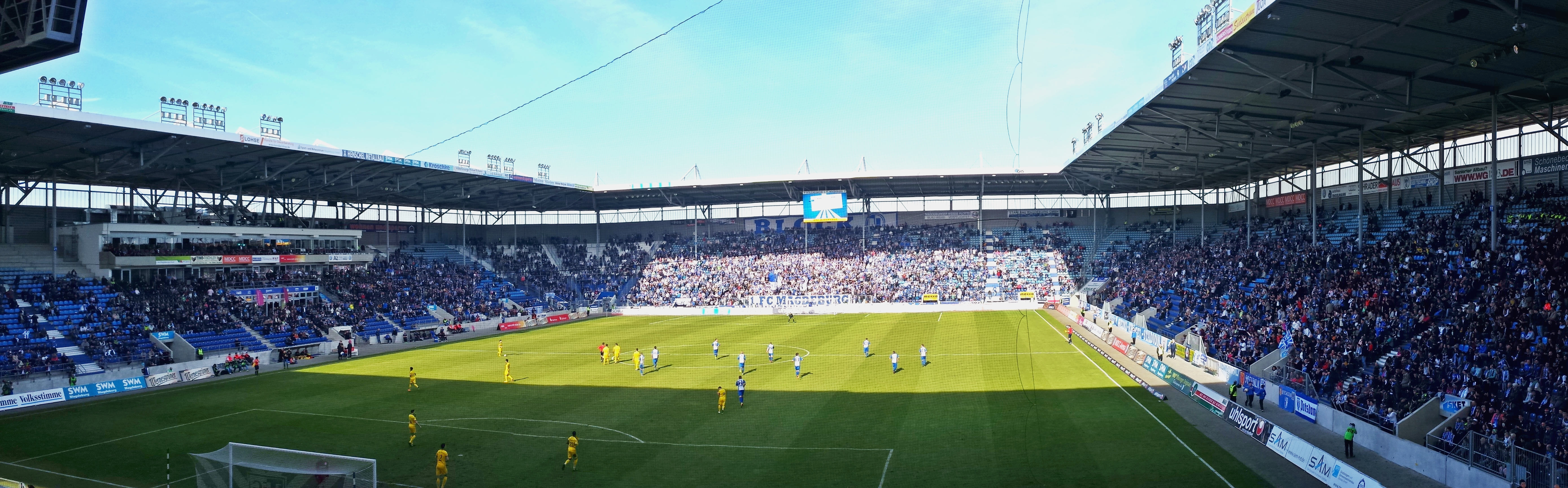 Heimspiel 1. FC Magdeburg in der MDCC-Arena gegen den VFC Plauen